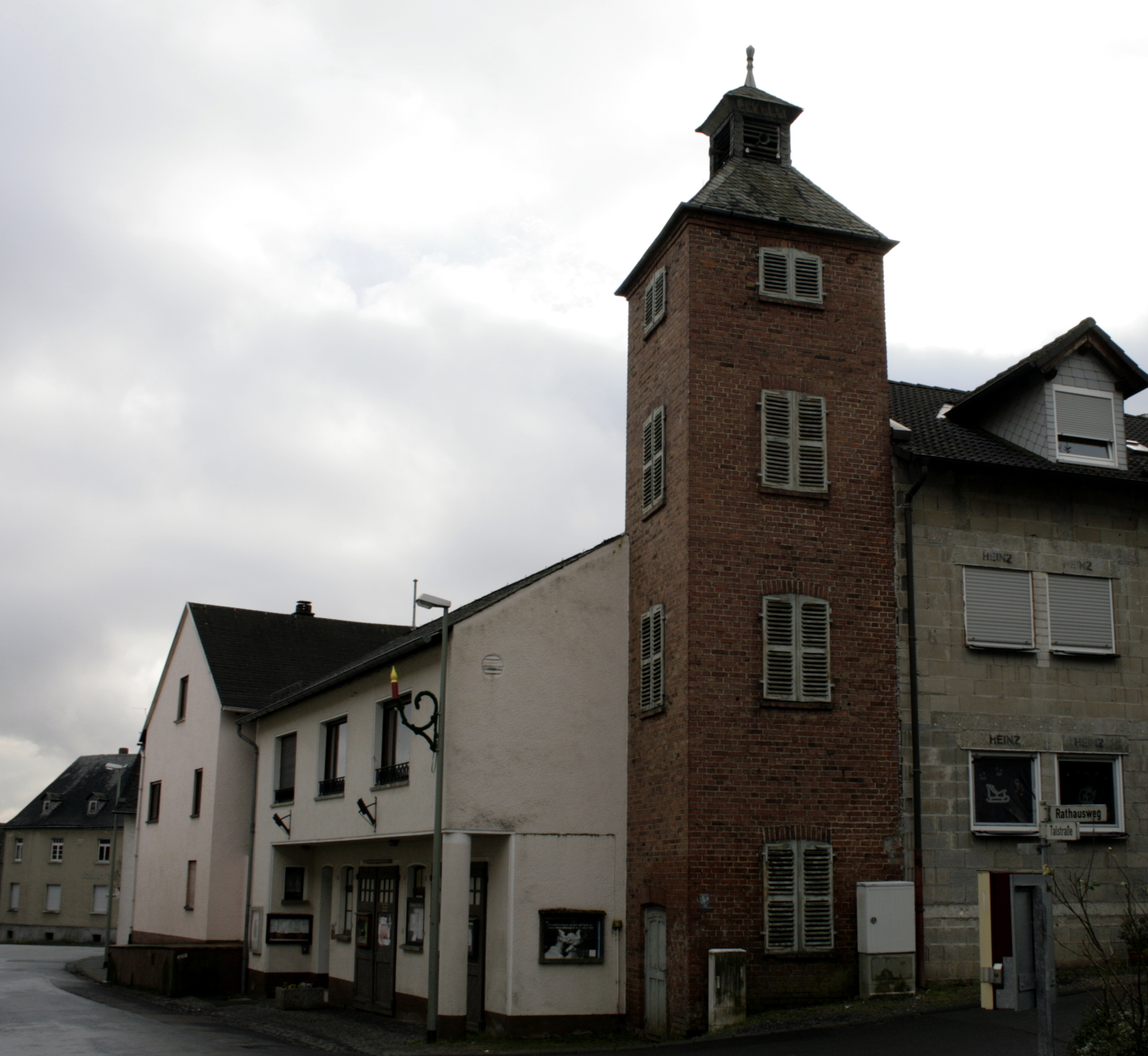 Ehemaliges Rathaus in Dornburg-Thalheim, Deutschland